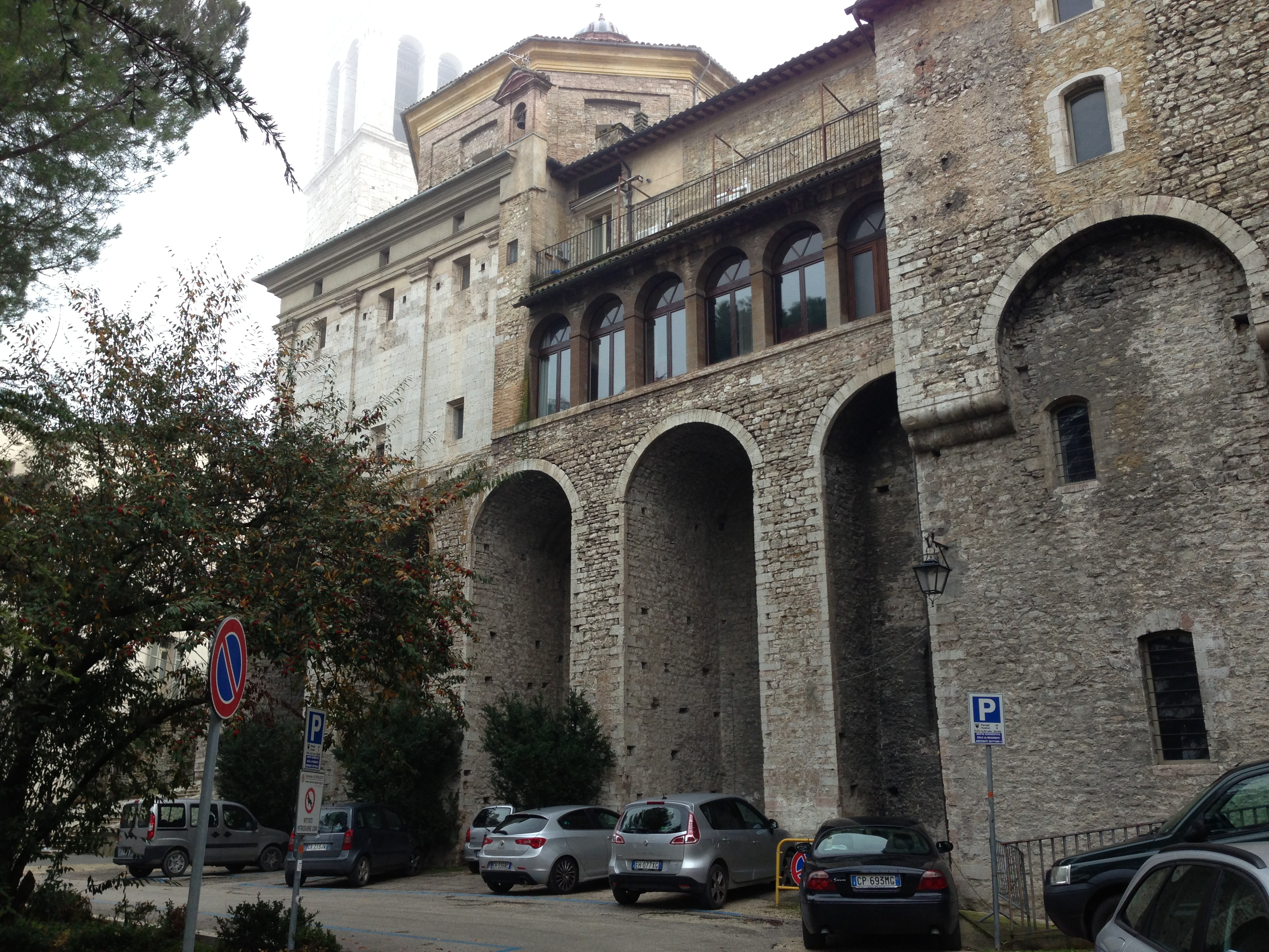 Retro del Teatro Caio Melisso di Spoleto